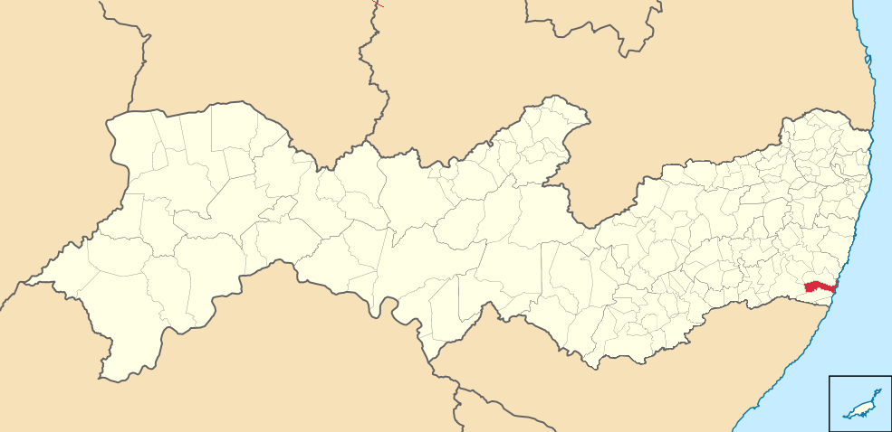 Mapa de Tamandaré (2)